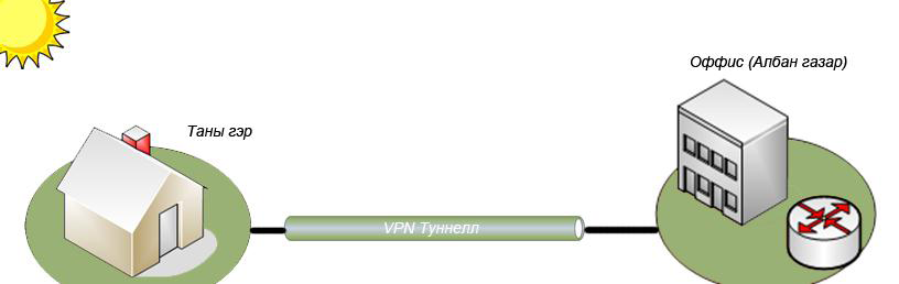 Монгол: Хостууд хоорондоо тунэль үүсгэн холбогдоно